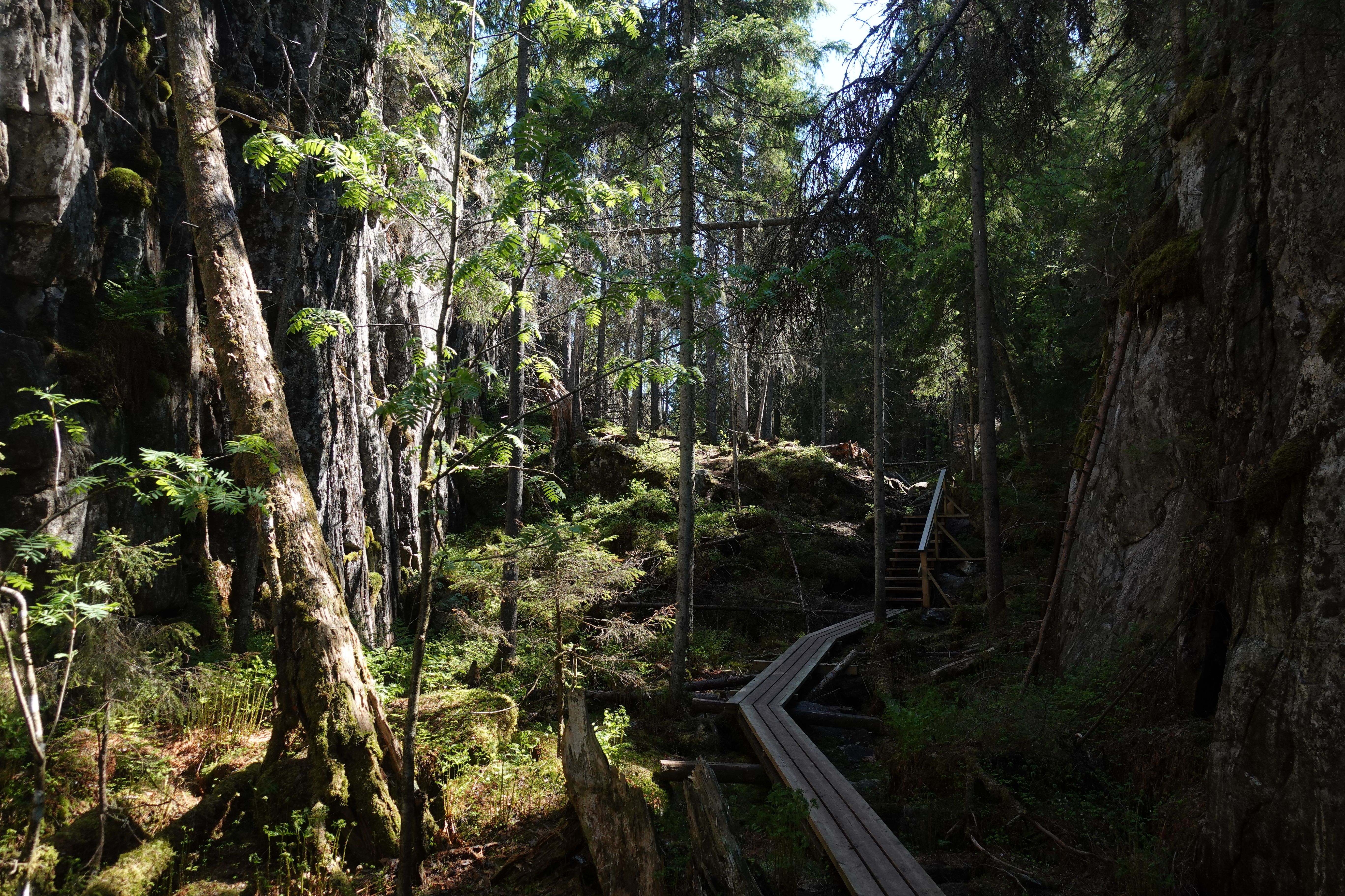 Orinoro Gorge near Leppävirta